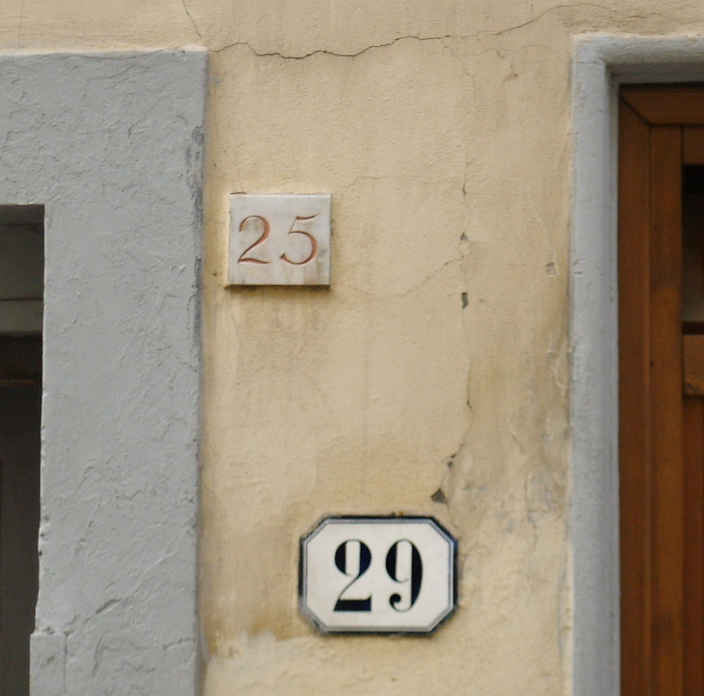 Numerazione_blu_e_rossa_firenze